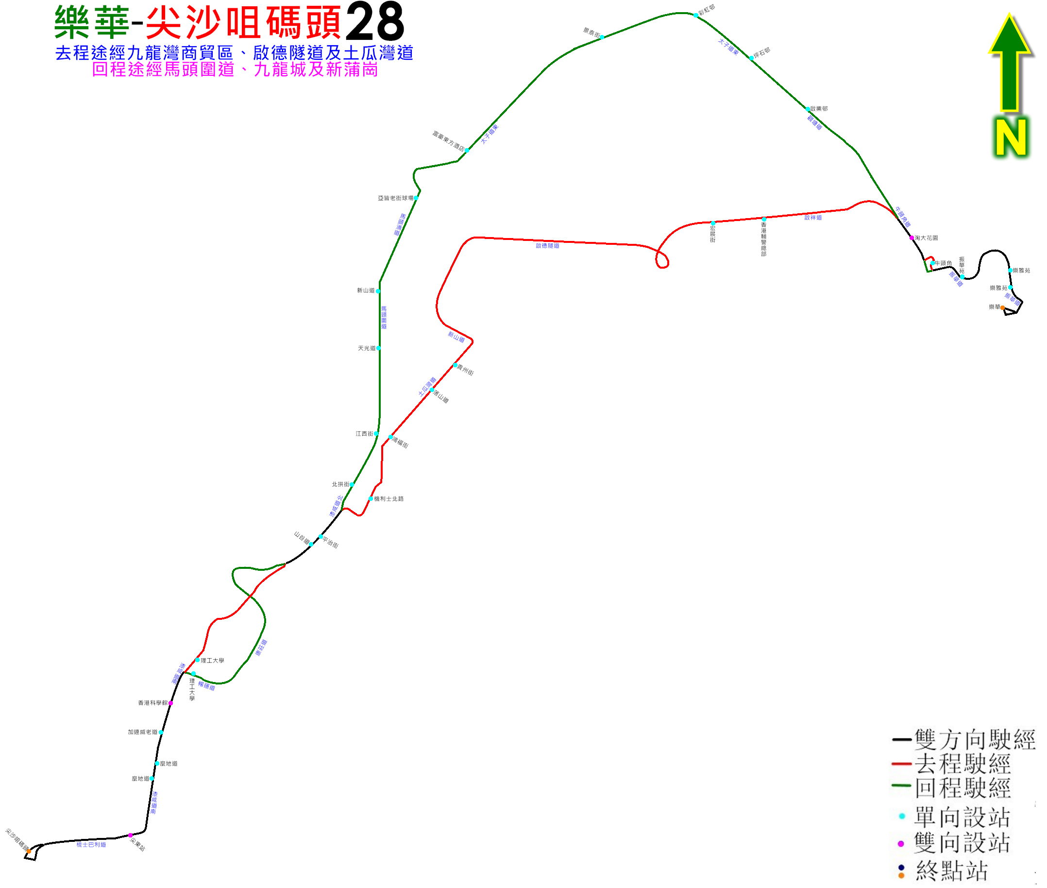 中文（香港）: 九巴28號線走線圖